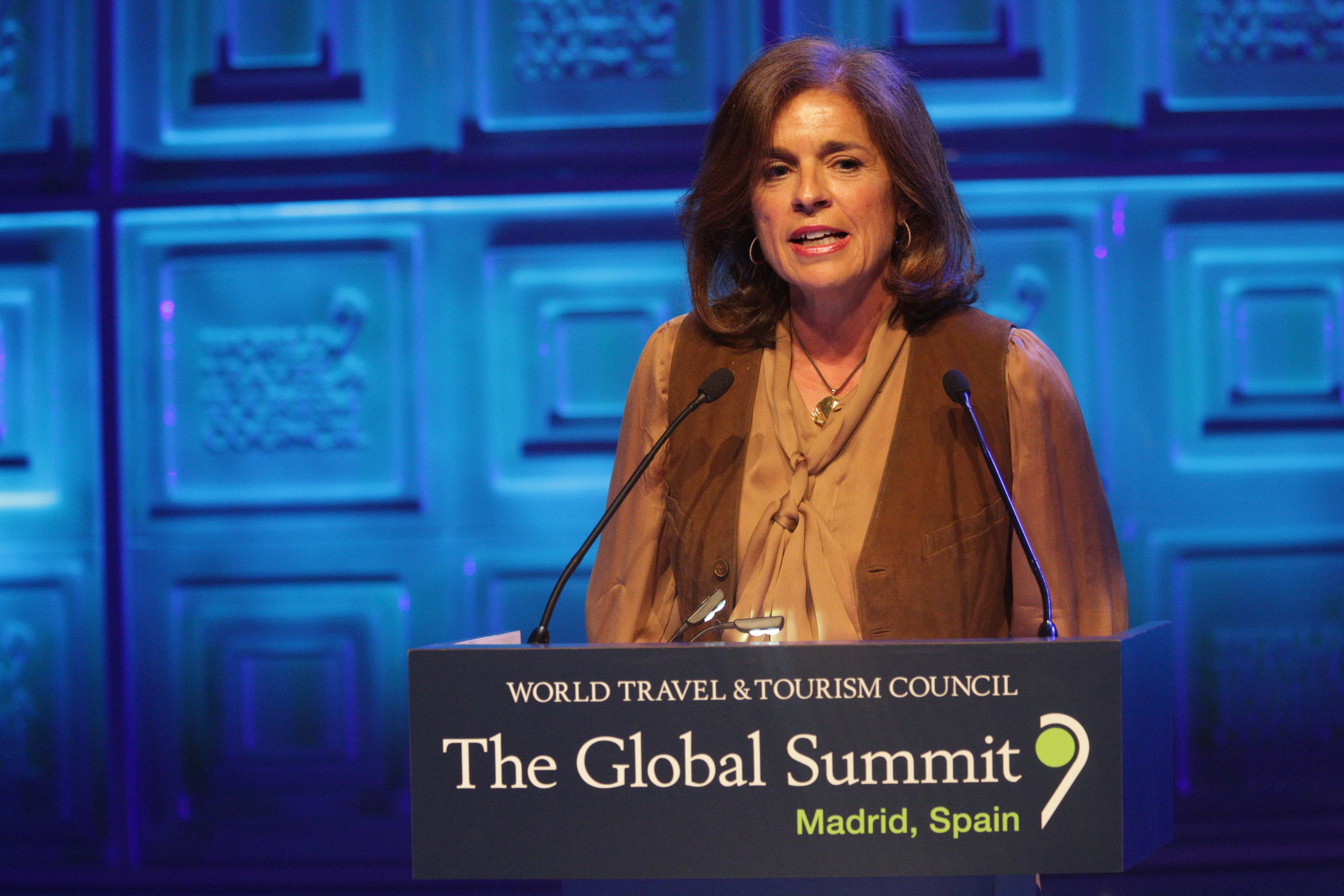 WTTC Global Summit 2015